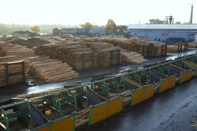 Территория комбината Сокольского ДОКа, биржа сырья. Россия